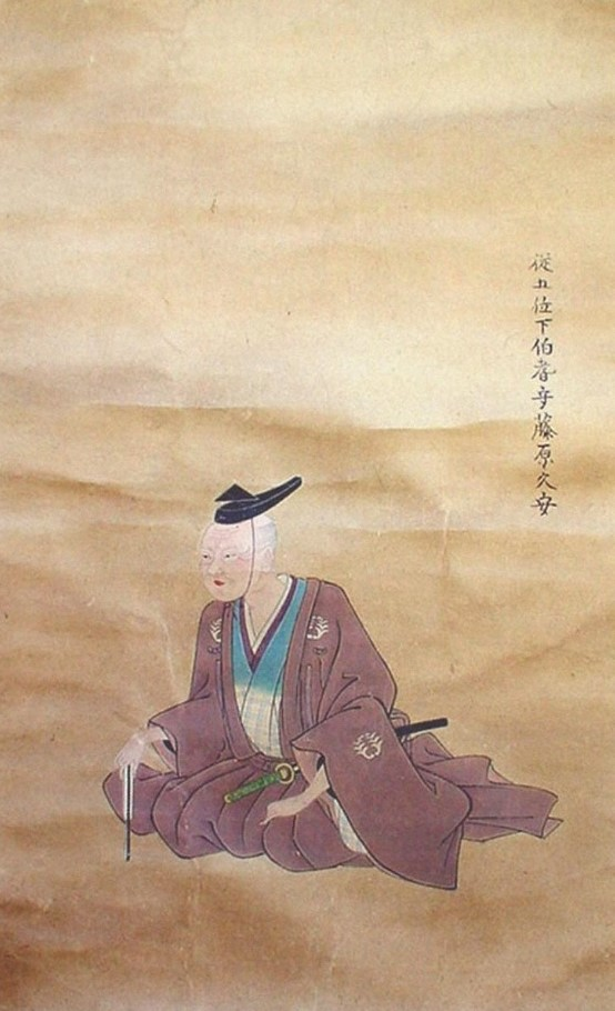 片山久安の肖像画。